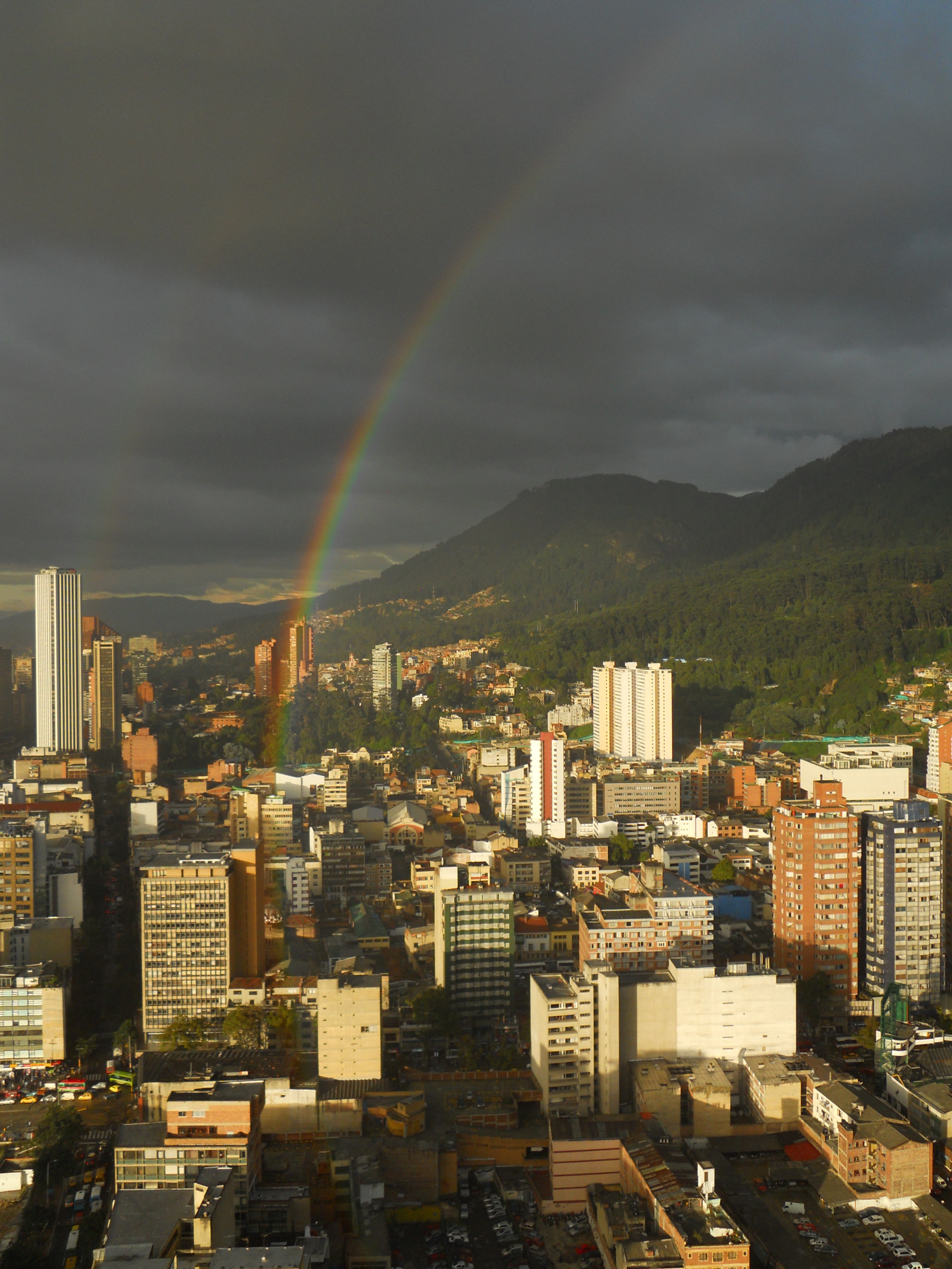 Arco iris en el centro de Bogotá.